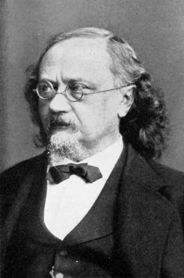 Julian Schmidt (1818–1886), deutscher Literaturhistoriker